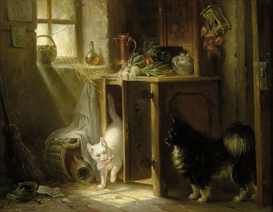 Wilhelm Heinrich Schaumann: "Ertappt" ( Bauernküche mit Spitz, der die Katze beim Diebstahl eines Bratens aus dem Vorratsschrank erwischt). Öl auf Leinwand. 32 x 41 cm. Unten links signiert und datiert "H. Schaumann 1870".